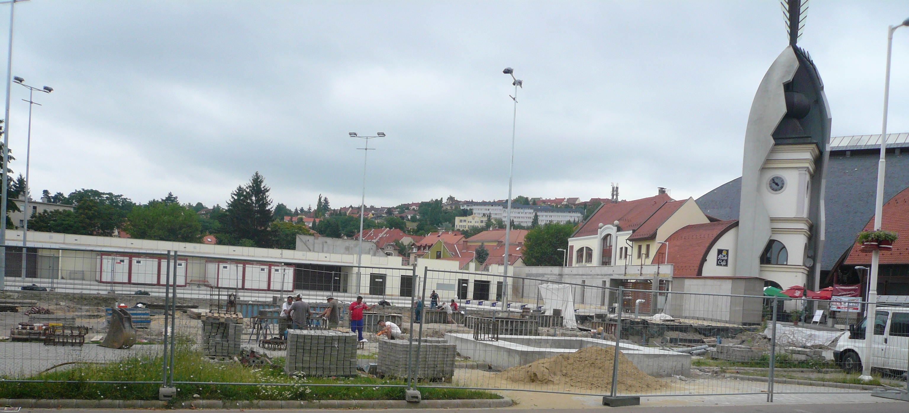 A Bárány-uszoda átépítése Egerben. Jobbra a Bitskey Aladár uszoda.